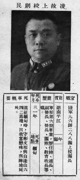 抗戰軍人忠烈錄第一輯中的烈士遺像